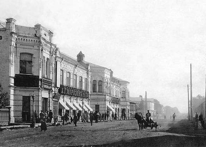 Улица Ползунова (Барнаул)